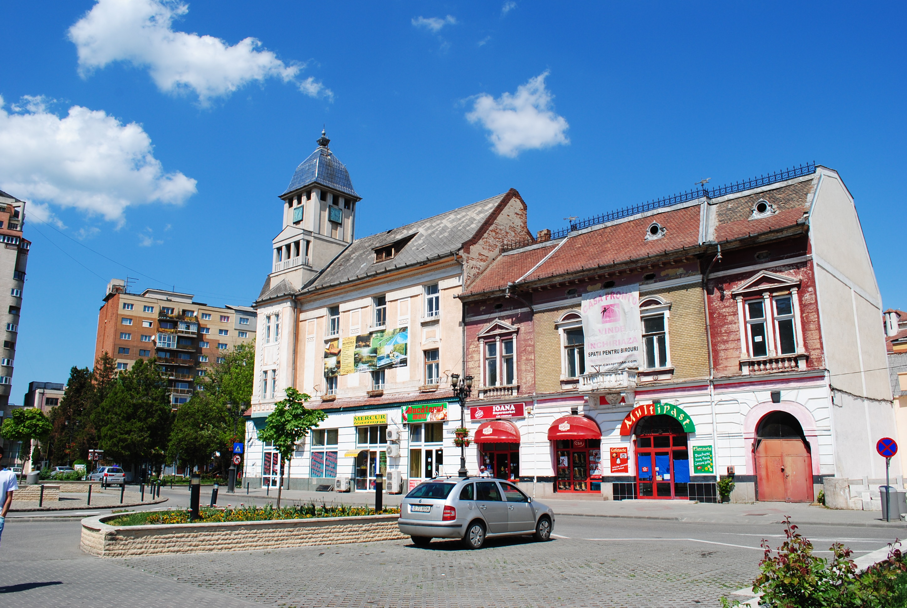 Cofetăria "Roșu și Negru" sec. XIX